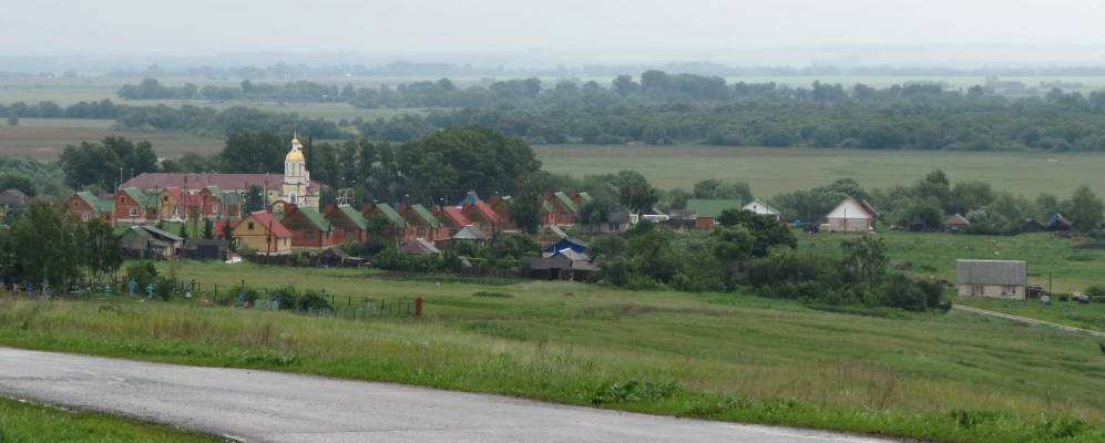 Вид на село Кашаево